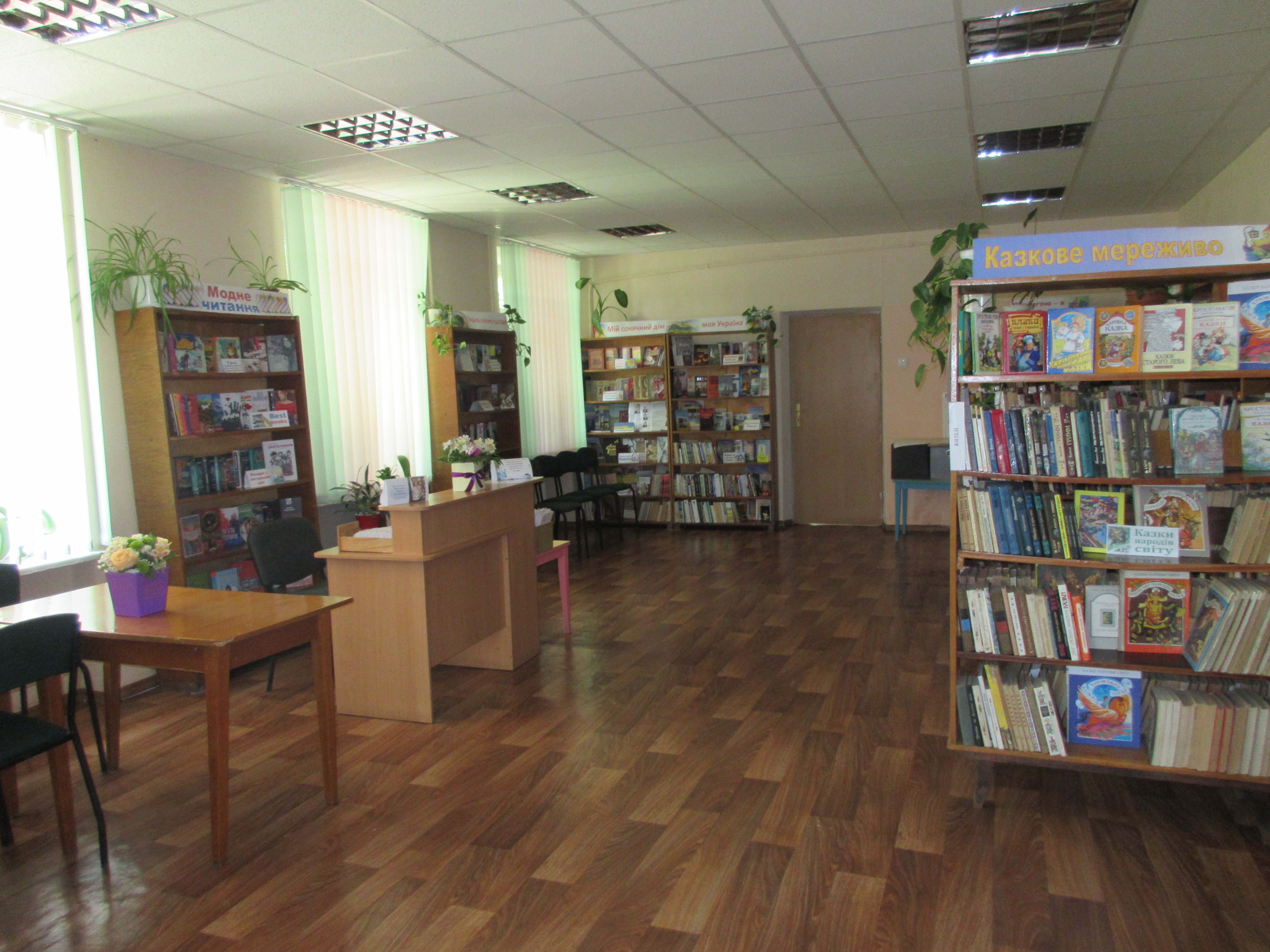 Фотознімок